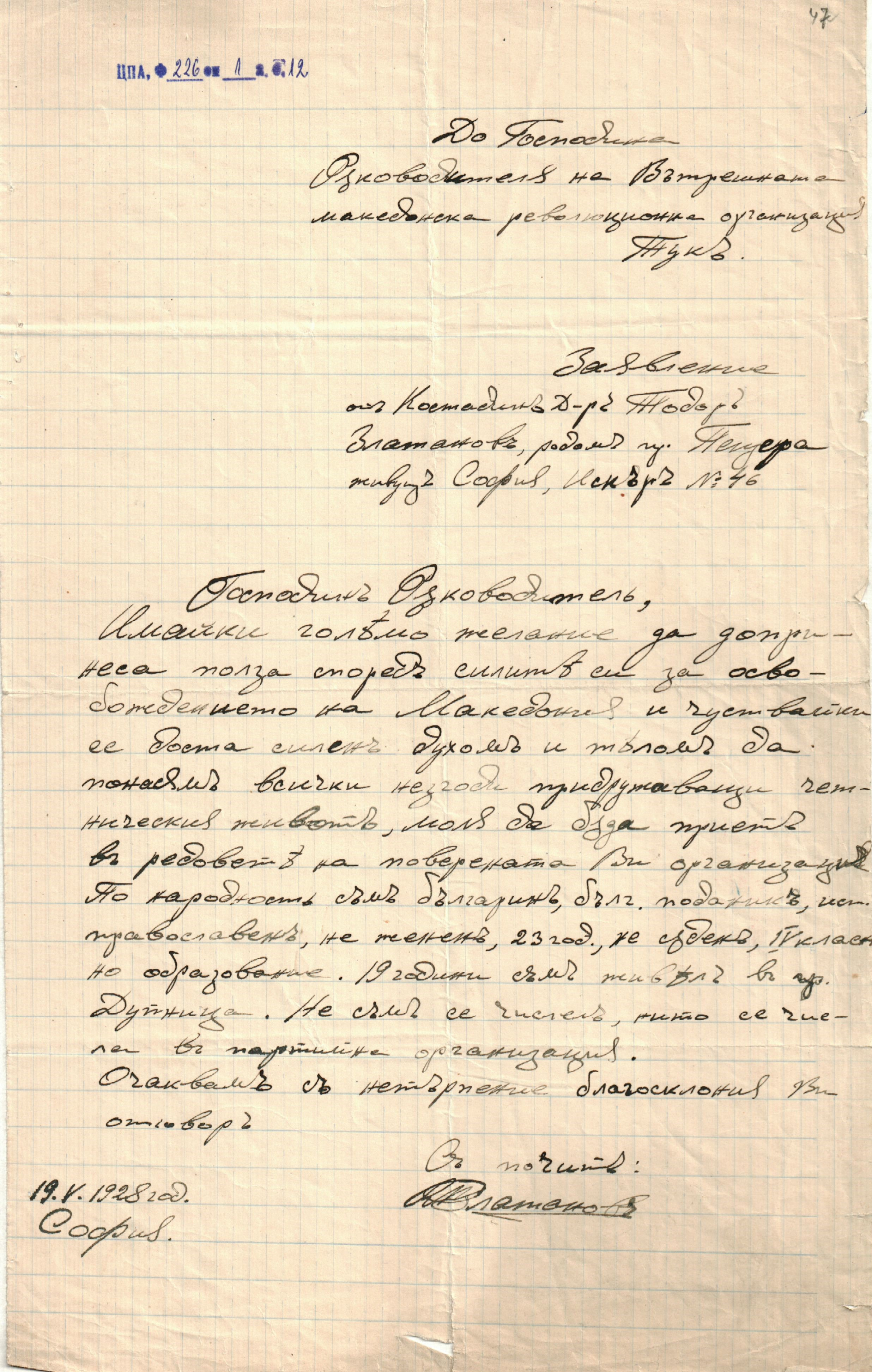 Писма от лица и ВМРО до ЦК и ЗП на ВМОРО за връзки с гръцки четници по време на Илинденското въстание, организирането на чети от Герджиков(ич) в Сърбия; връзки между ВМОРО и арменската революционна организация „Дашнакцутюн“, събиране на федеристи и комунисти в читалище „Гоце Делчев“ в София; дейността на П. Шатев, М. Герджиков и Спиро Василев сред емиграцията в Цариград; разпределяне работата в пунктовете и др.